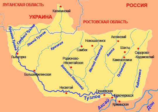 Карта бассейна Тузлова.